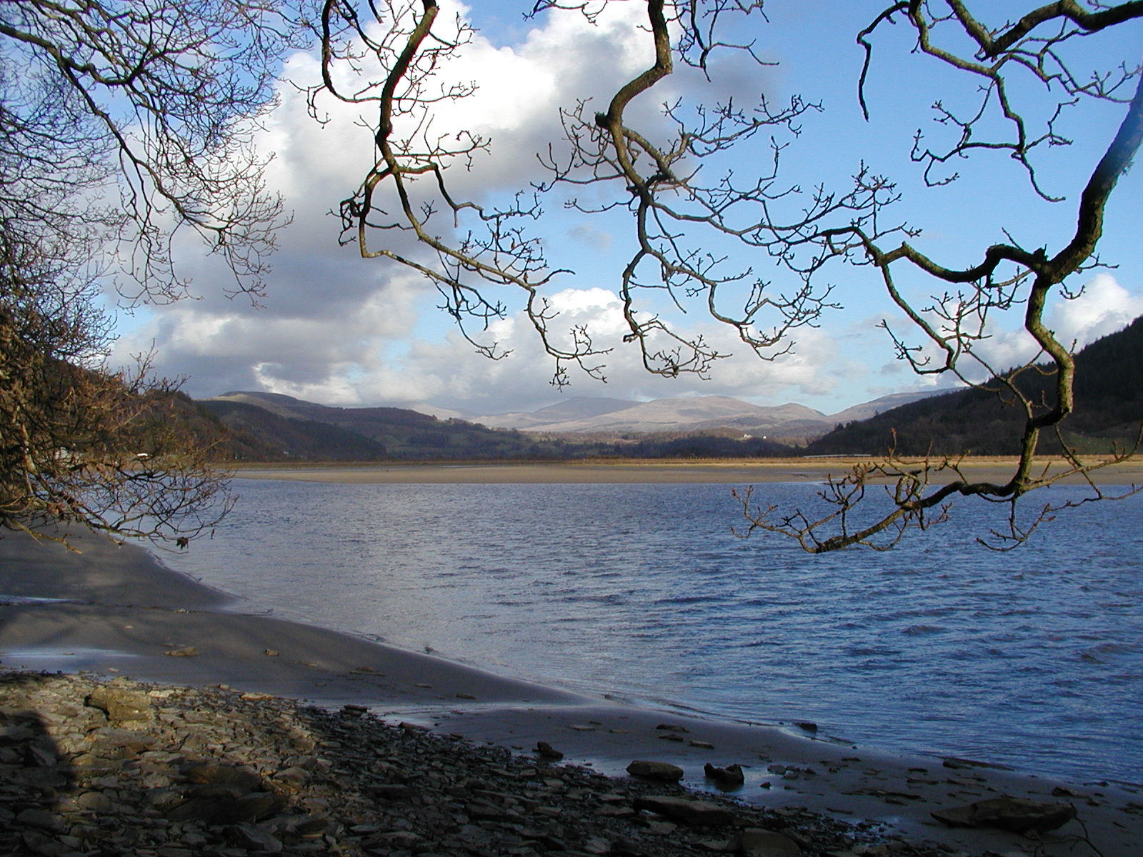 afon Mawddach